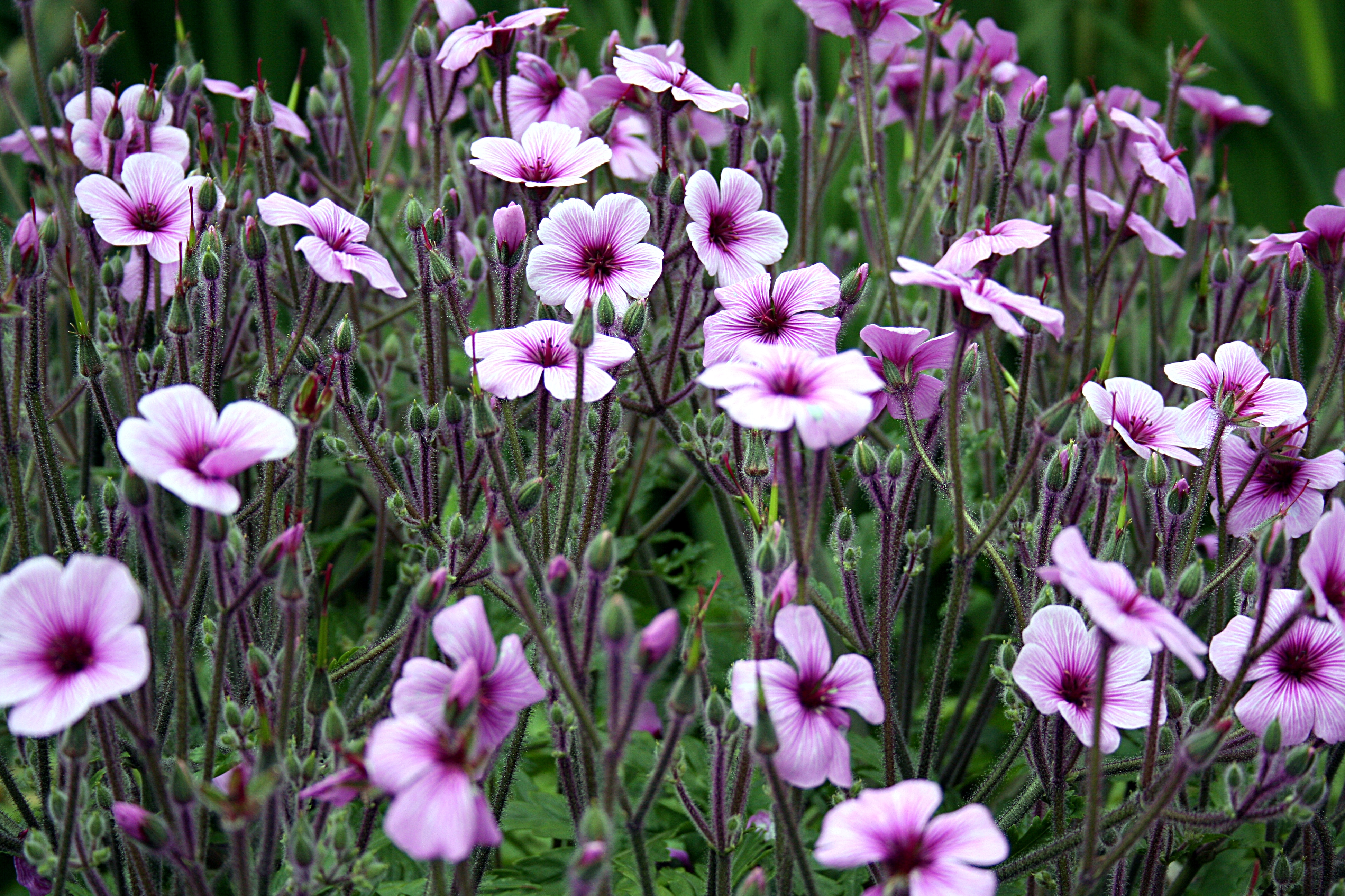 Geranium maderense. In the gardens of Quinta do Palheiro Ferreiro, in Funchal, Madeira. Endemic to Madeira.